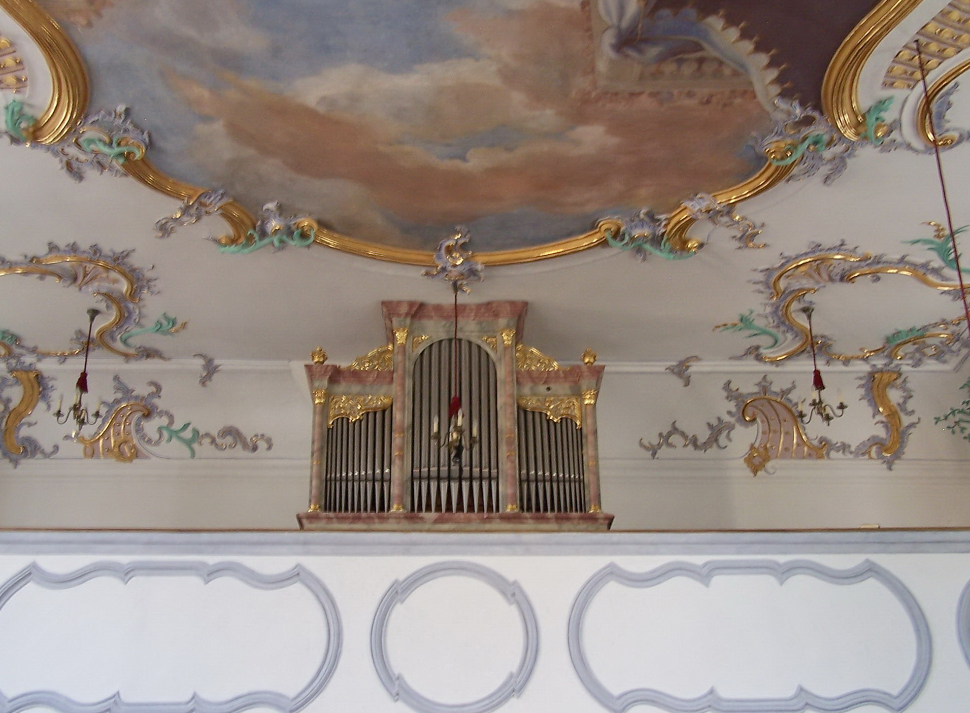 Mintraching, Scheuer, Dorfstraße 35. Kath. Wallfahrts- und Expositurkirche St. Maria. Saalbau mit eingezogenem Chor, Flankenturm mit Zwiebelhaube, bezeichnet 1461, Barockisierung ab 1722. Empore mit Orgel vom Straubinger Orgelbauer Anton Ehrlich.